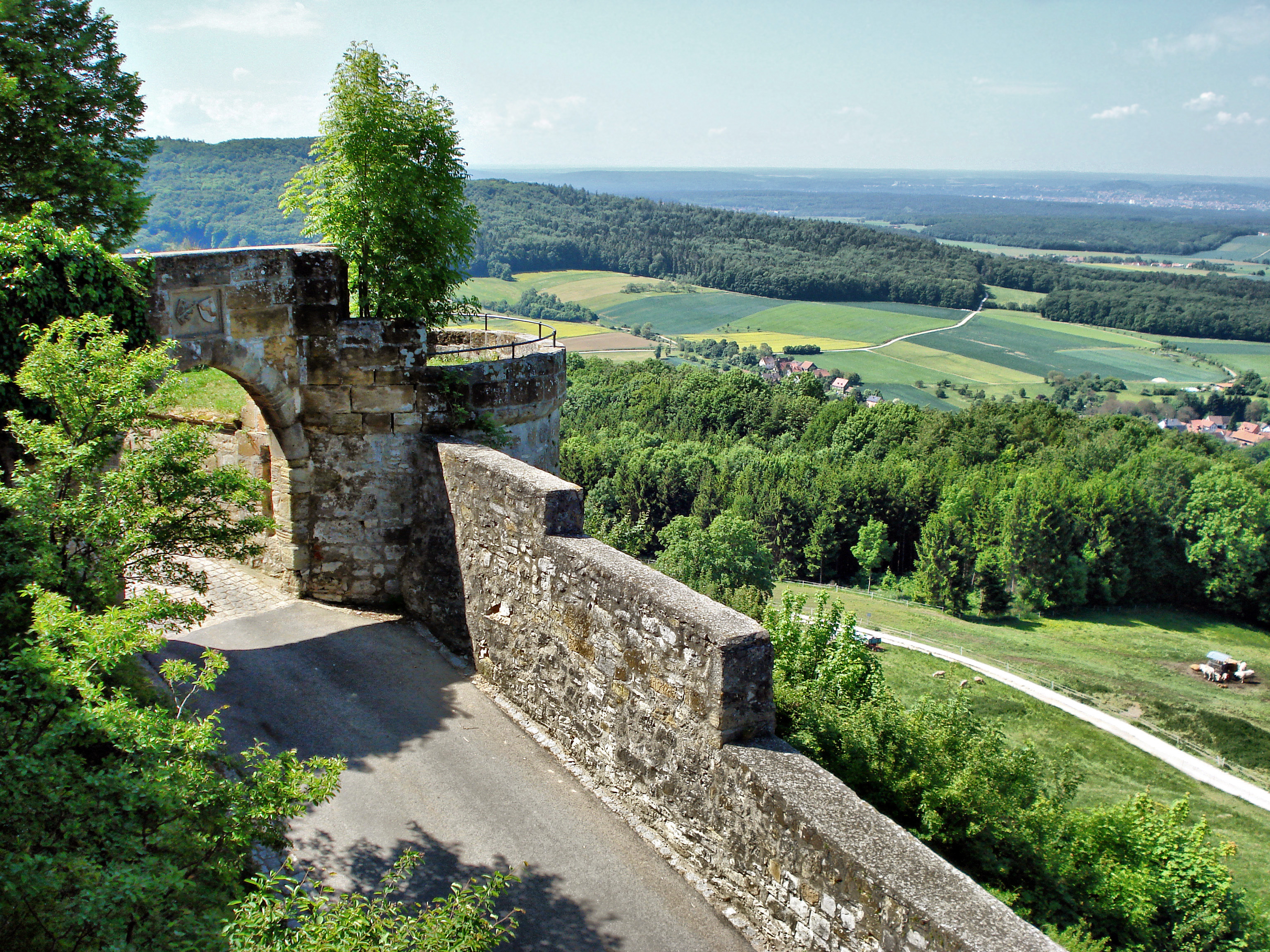 Blick von der Giechburg, Oberfranken, Bayern, Deutschland